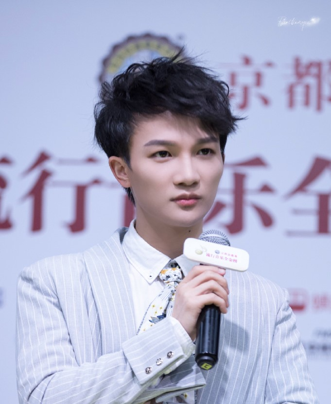 周深于2019年3月北京召开的“流行音乐全金榜”启动记者会上